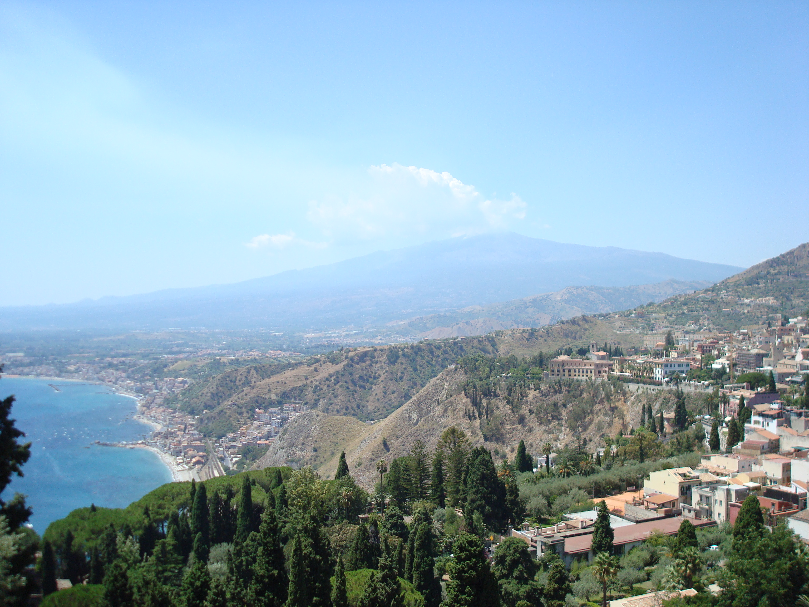 Этна. Вид из города Таормина